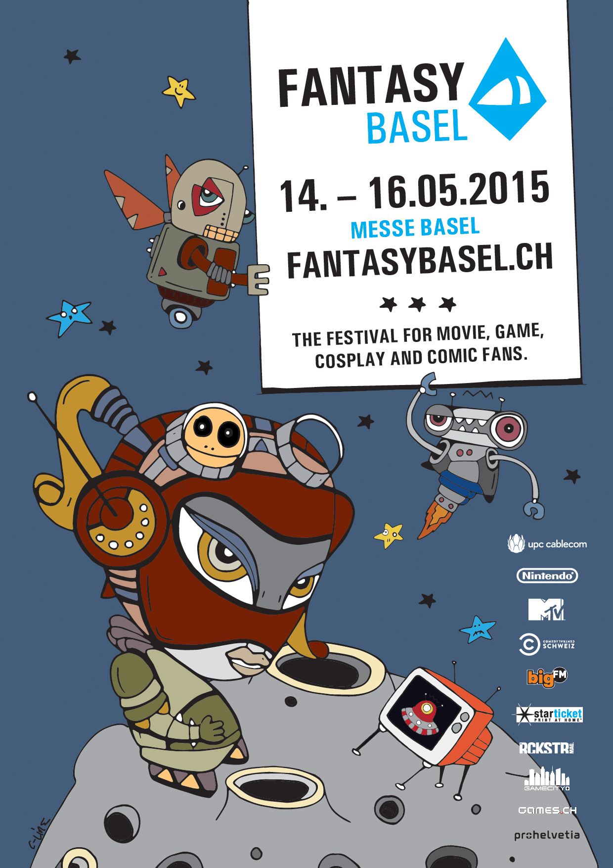 Visual: FANTASY BASEL - The Swiss Comic Con 2015 by C-Line